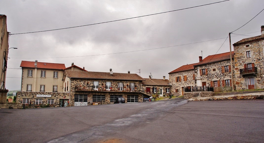 Place du Village